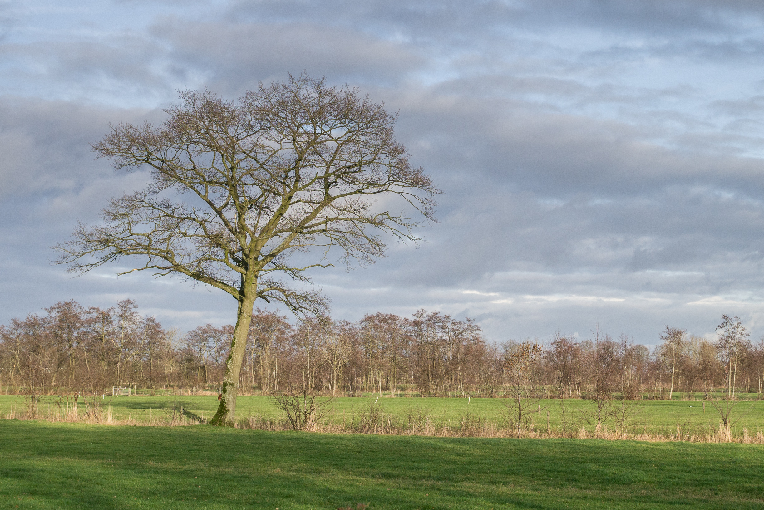 Coulisselandschap de Friese Wouden